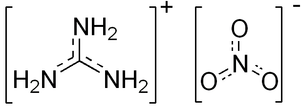 chemical structure of guanidinium nitrate